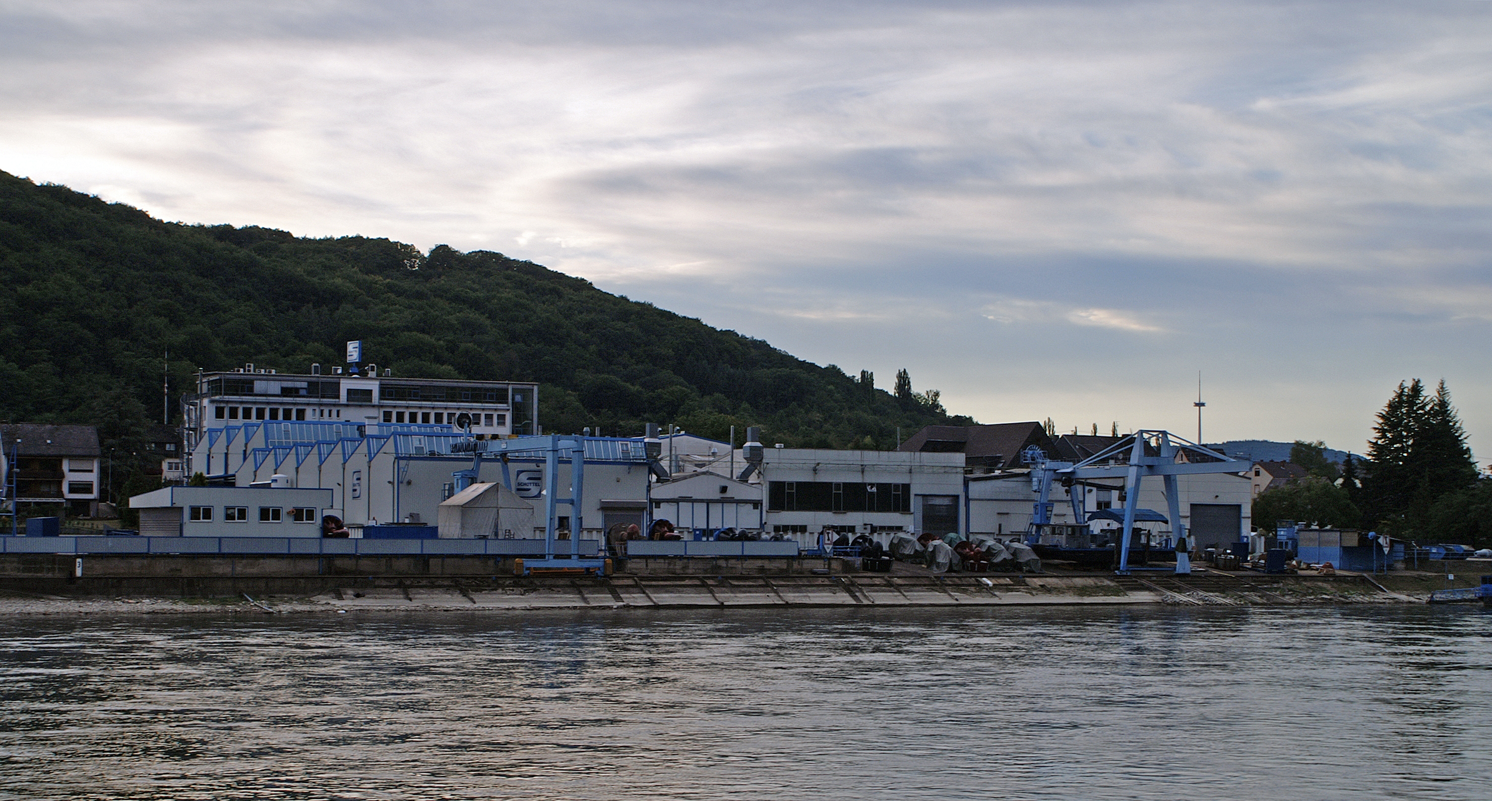 Die Schottel GmbH in Spay am Rhein.